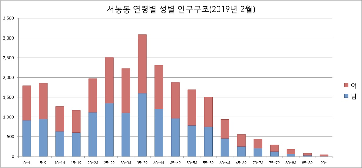 용인시 서농동 성별 연령별 인구구조